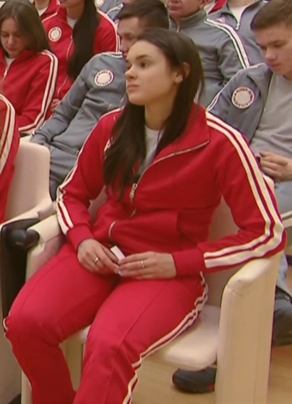 Софья Сергеевна Просвирнова (род. 20 декабря 1997) — российская шорт-трекистка